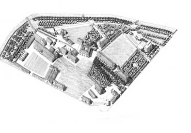 ILVA